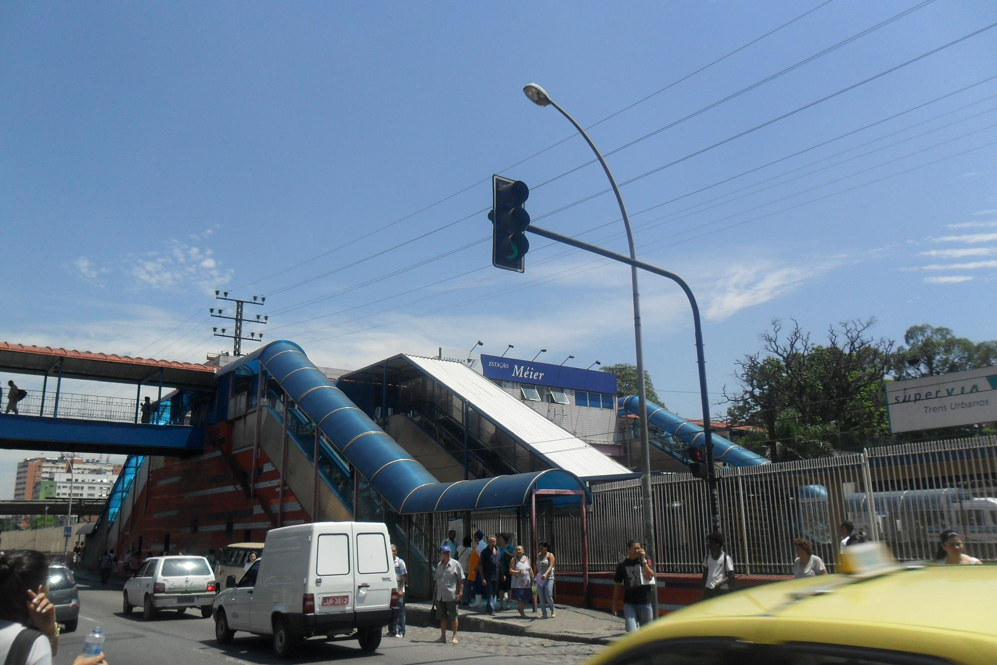 Estação Meier